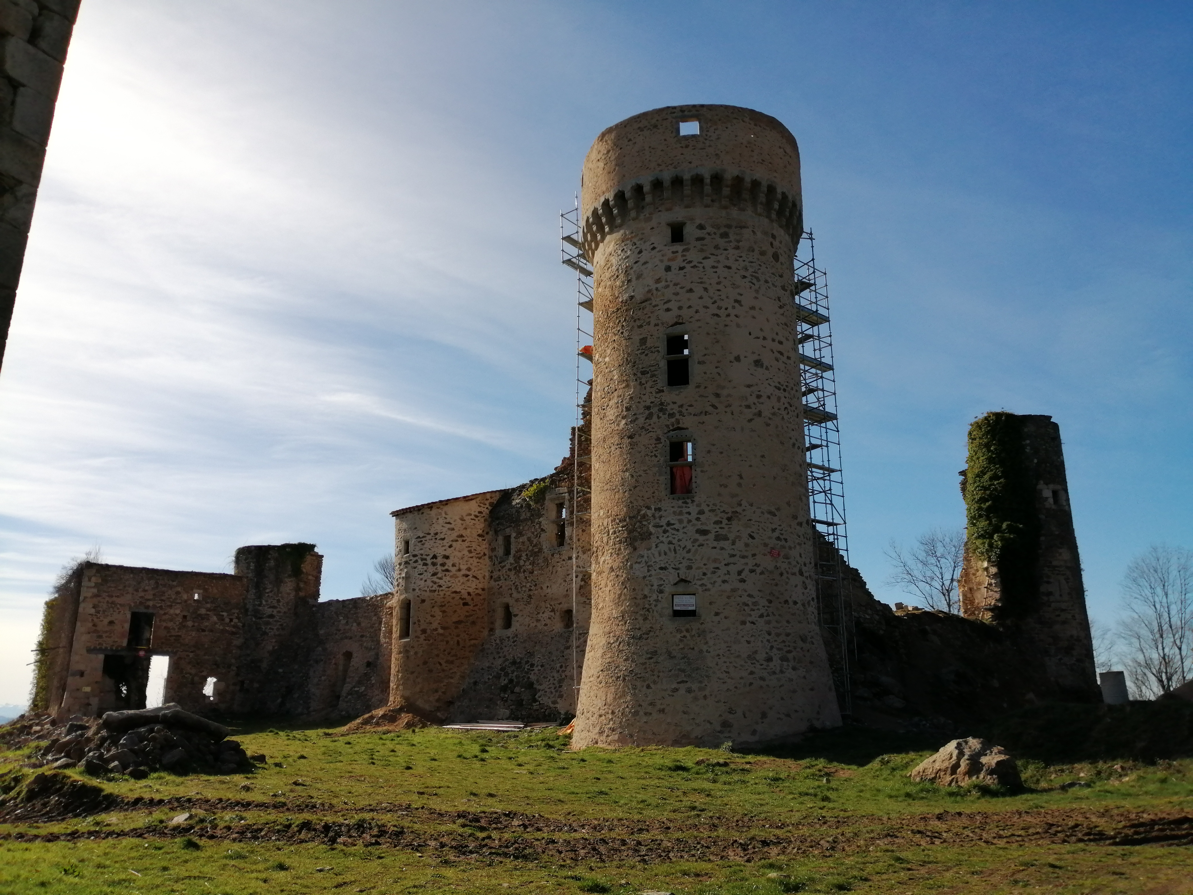 Vue sur le donjon du château de la Faye (printemps 2019)